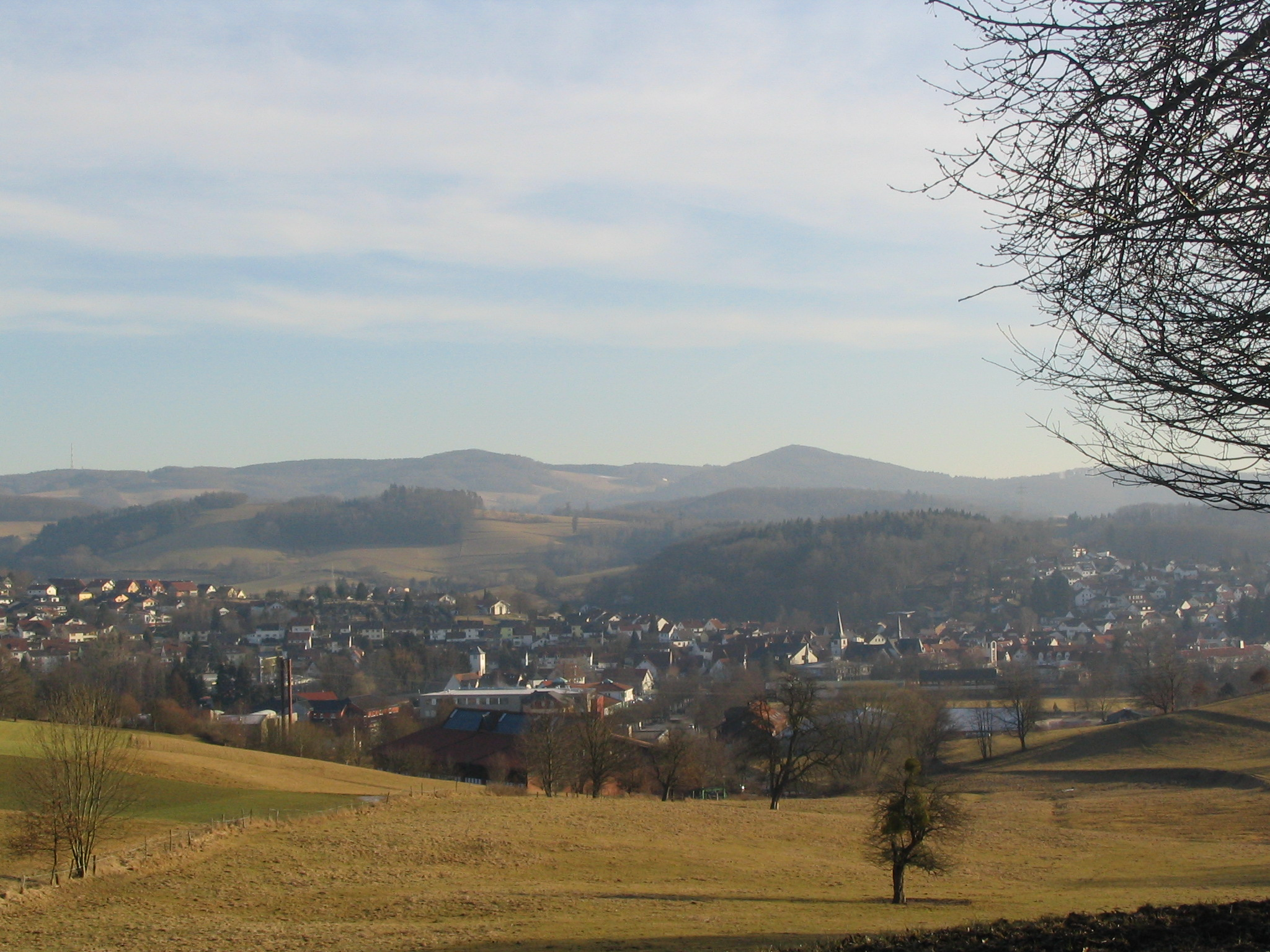 Mörlenbach im Weschnitztal vor den Granodiorit-Granit-Höhen Götzenstein und Kisselbusch